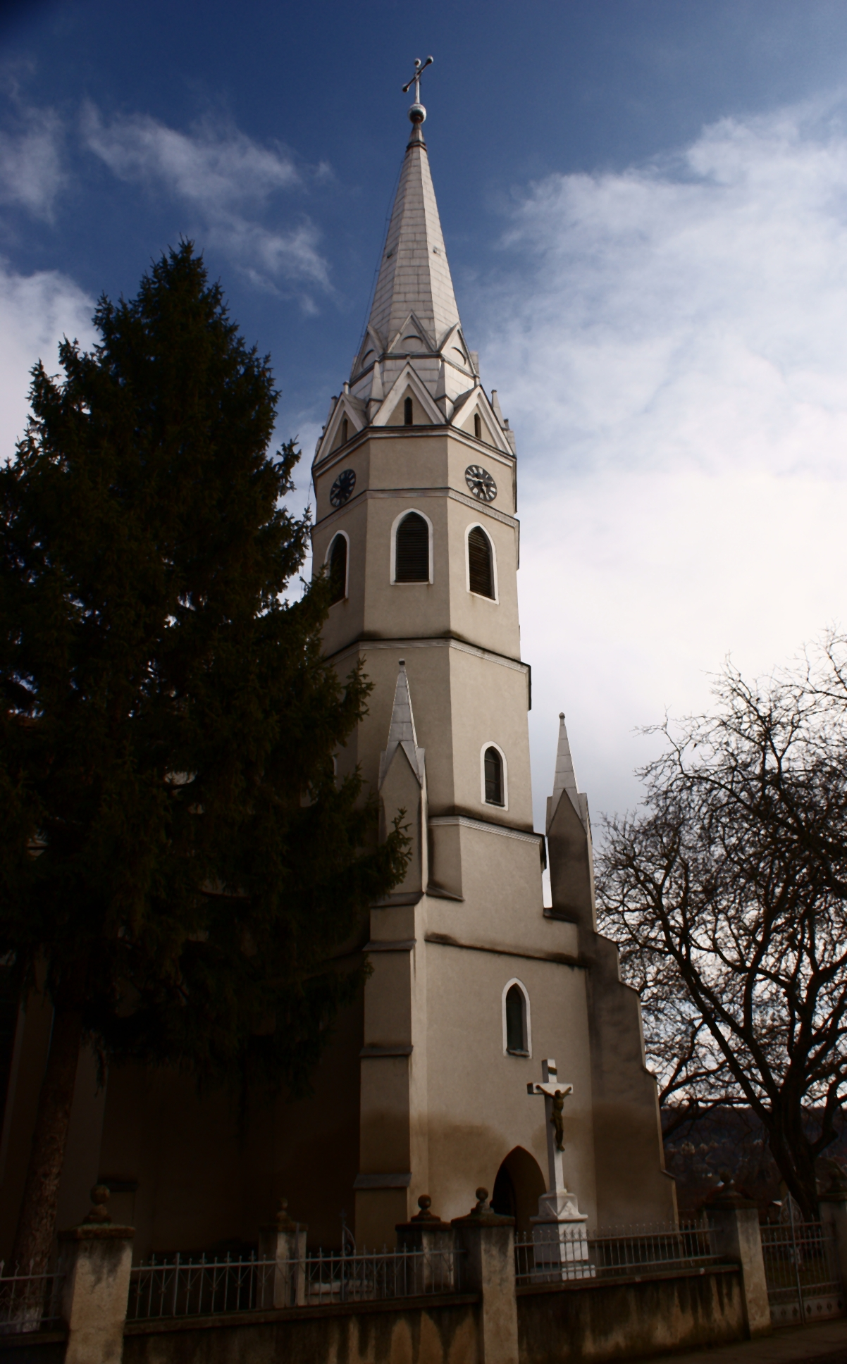 Krasznabéltek, katolikus templom